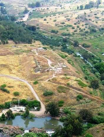 מצד עתרת, צילום אוויר לכיוון צפון. צילמתי והעלתי ב8 במאי 2006. בחלקה הימני והתחתון של התמונה נראים מי נהר הירדן ובחלקה העליון - גשר בנות יעקב. אסף.צ 19:23, 8 מאי 2006 (IDT) Atheret fortress, Jordan river, Israel